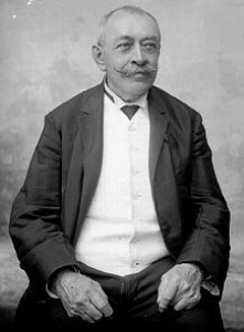 Siegel Carl Anton (1851-1943)